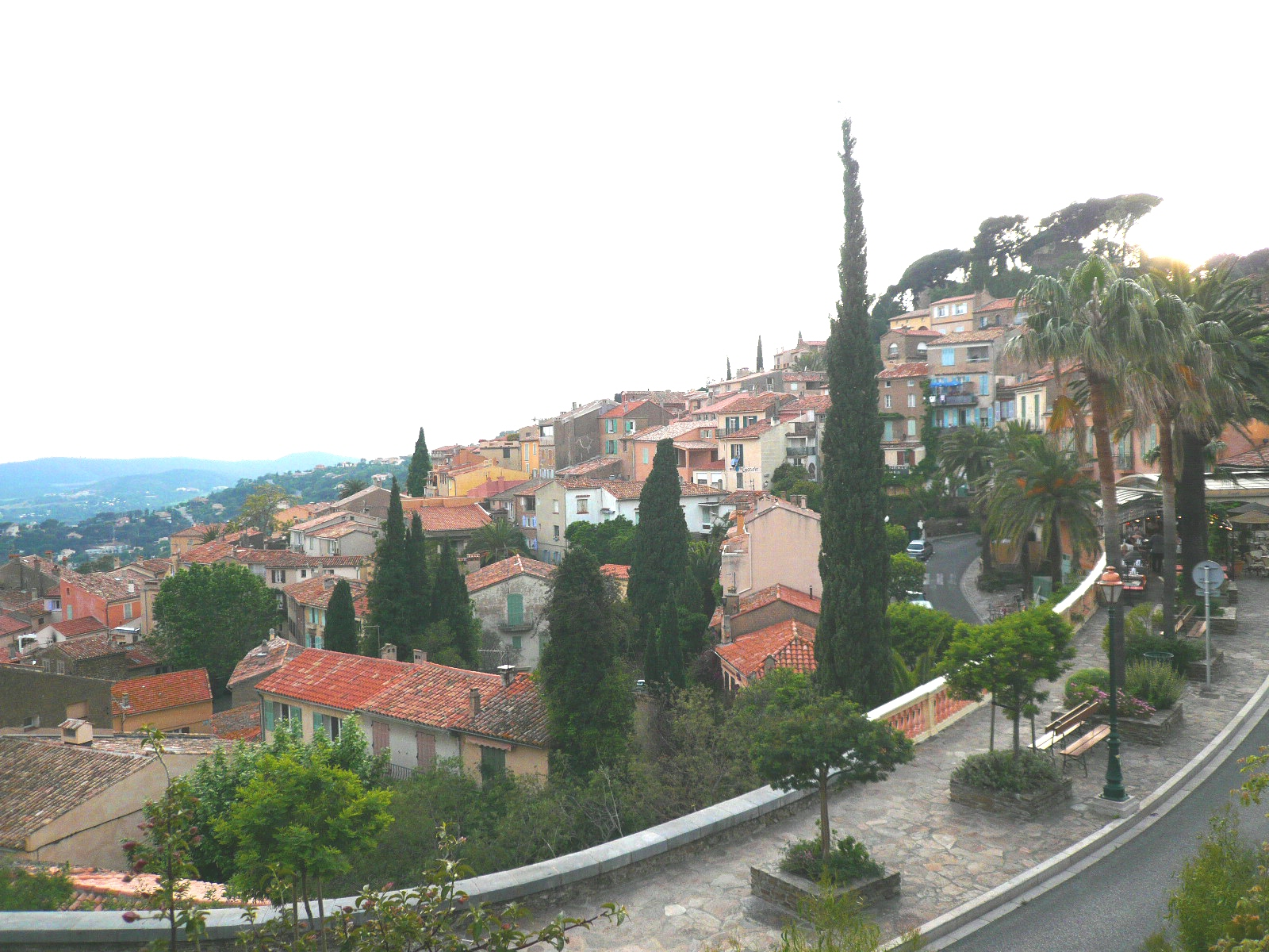 Vue d'ensemble de Bormes-les-Mimosas